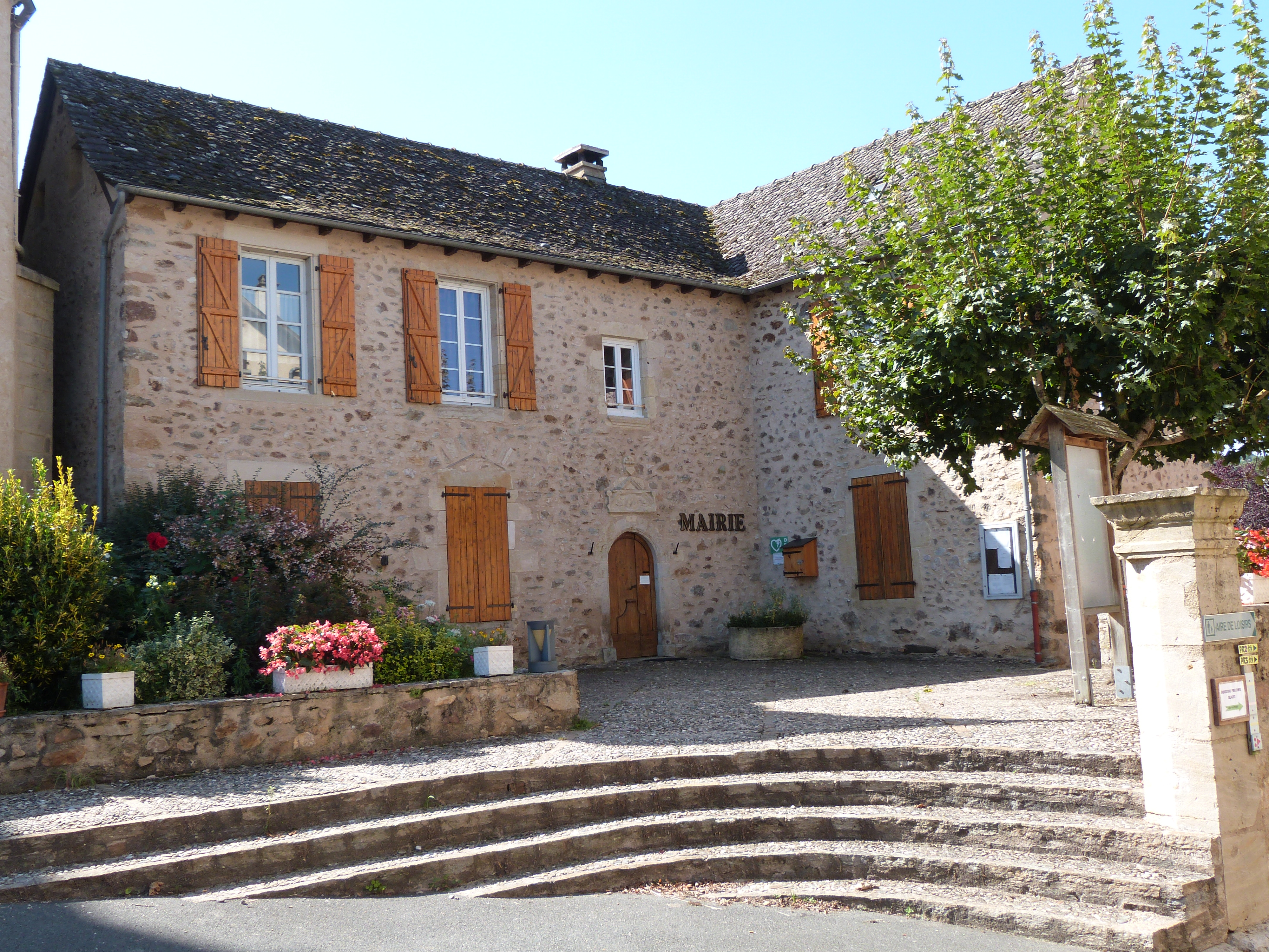 Façade de la mairie de Compolibat